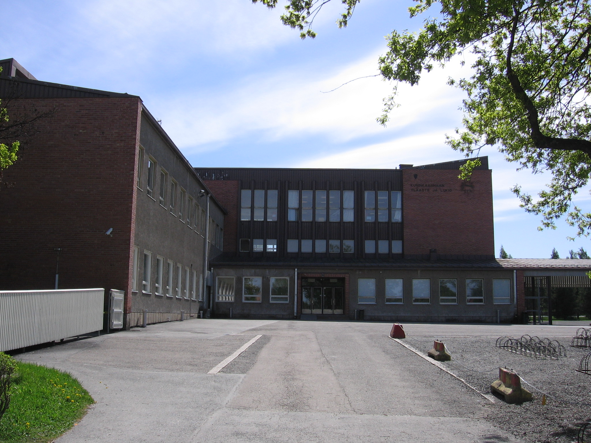 Kuninkaanhaan yläaste Porissa